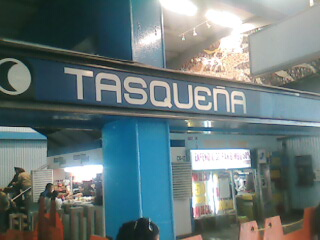 Letrero en la estacion Tasqueña Linea 2